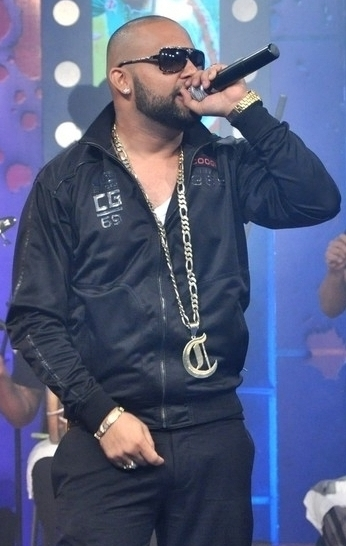 El Cata, cantante dominicano de música urbana.